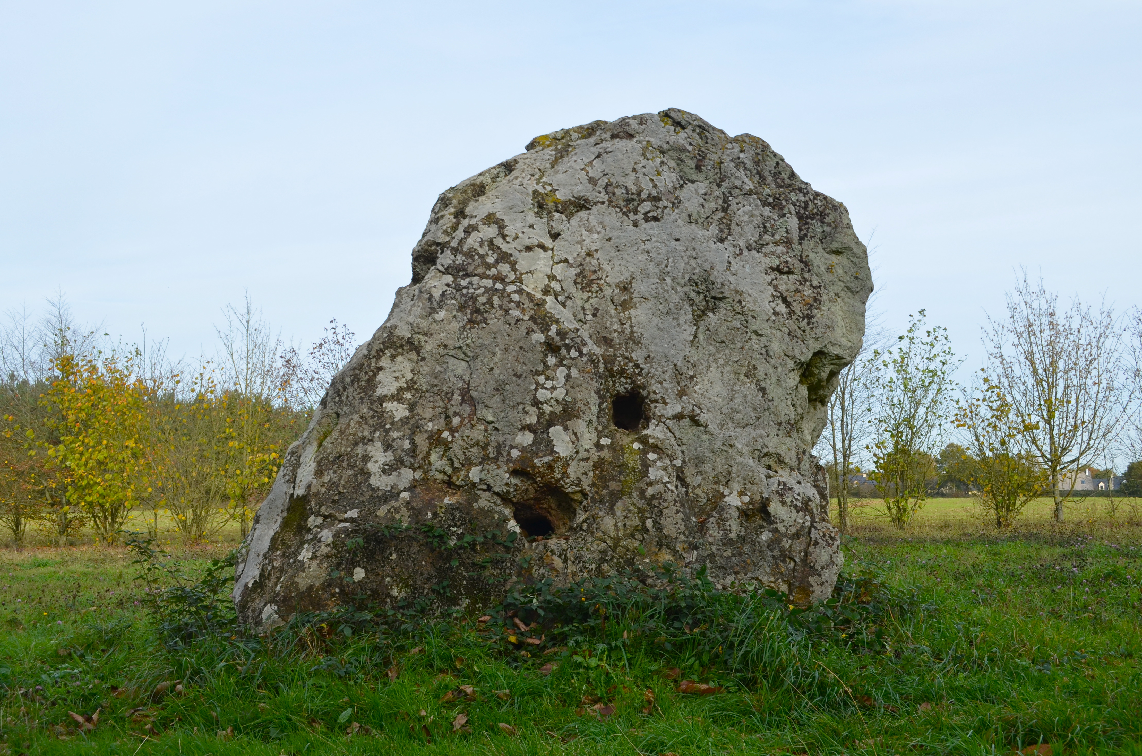 Menhir des Louères - Saint-Aubin-des-Châteaux (Loire-Atlantique)